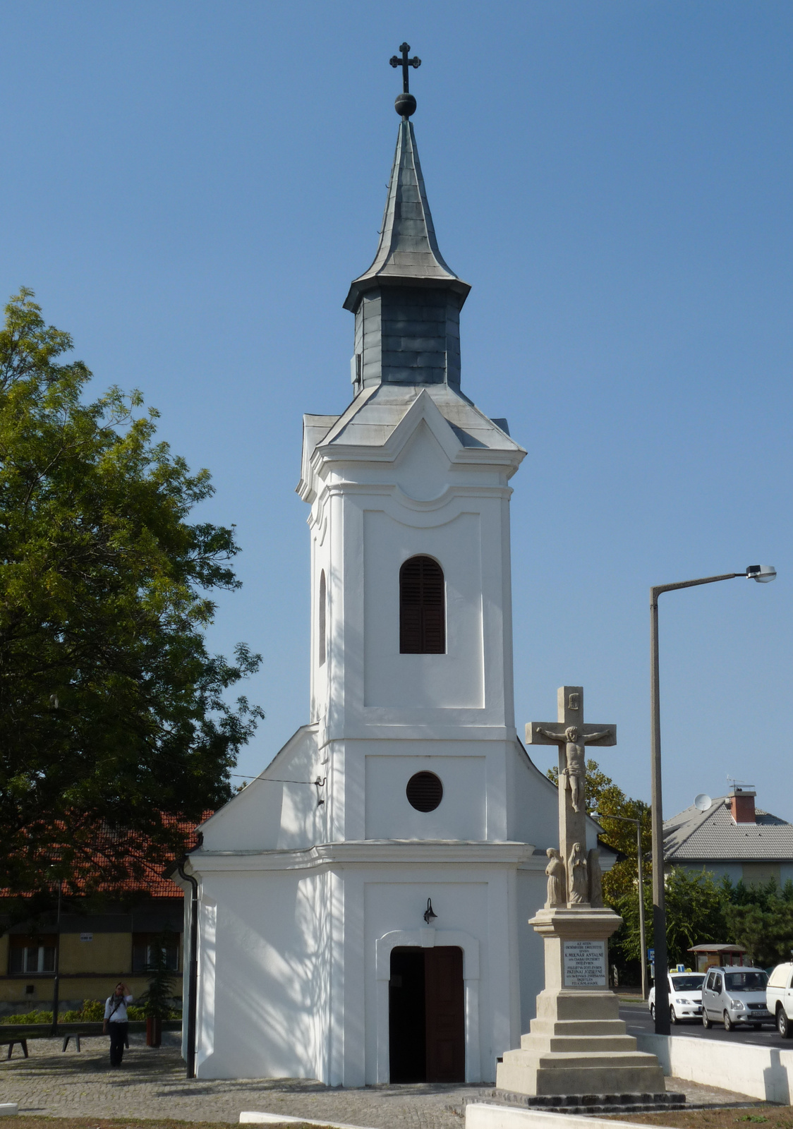 Xav. Szt. Ferenc kápolna (Szolnok, Ady Endre út) This is a photo of a monument in Hungary. Identifier: 6041